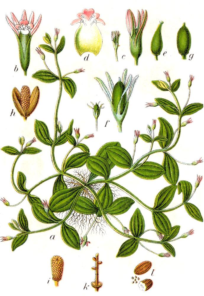 Lindernia procumbens (Krock.) Borbás, syn. Lindernia palustris Hartmann, Lindernia pyxidaria All. Original Caption Lindernie, Lindernia pyxidaria